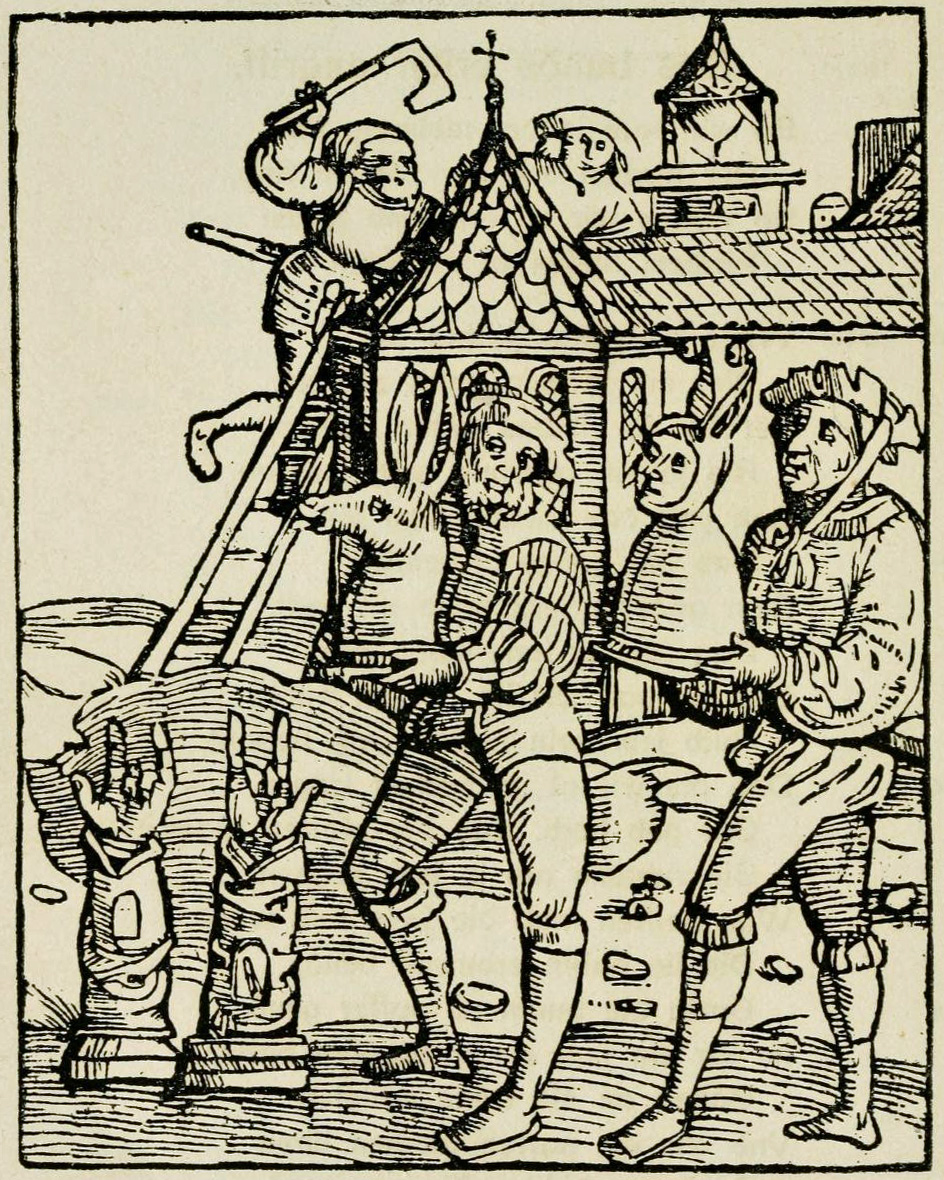 Scène d'iconoclasme illustrant Le Grand Fou luthérien (Von dem grossen Lutherischen Narren) de Thomas Murner. 1522, p. 220